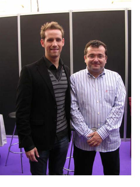 Acto de entrega del Premio Pilar Miró 2008